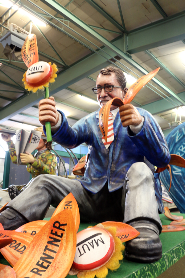 Präsentation der MCV-Motivwagen für den Mainzer Rosenmontagszug 2015-. Bundesminister für Verkehr und digitale Infrastruktur Alexander Dobrindt zerpflückt eine Maut-Blume. Blütenblätter sind diverse Bürgergruppen, für die eine Maut infrage kommt. Im Hintergrund Flintenuschi